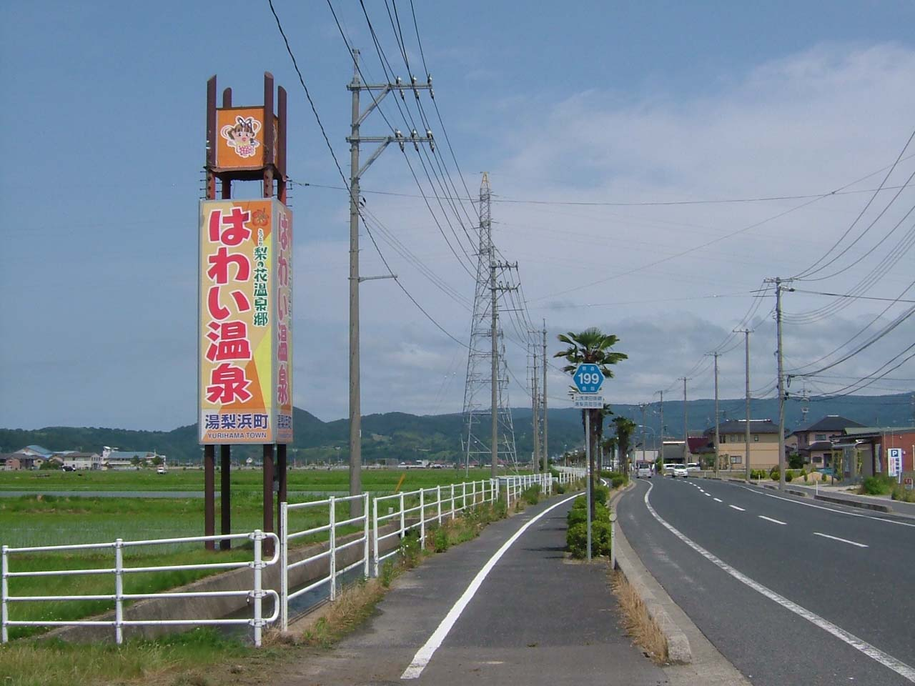 鳥取県道199号上浅津田後線沿いに立つ羽合温泉の看板